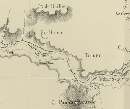 De Purey a El Gato en el Mapa de Expedicion de la Francisco Vidal Gormaz 1869